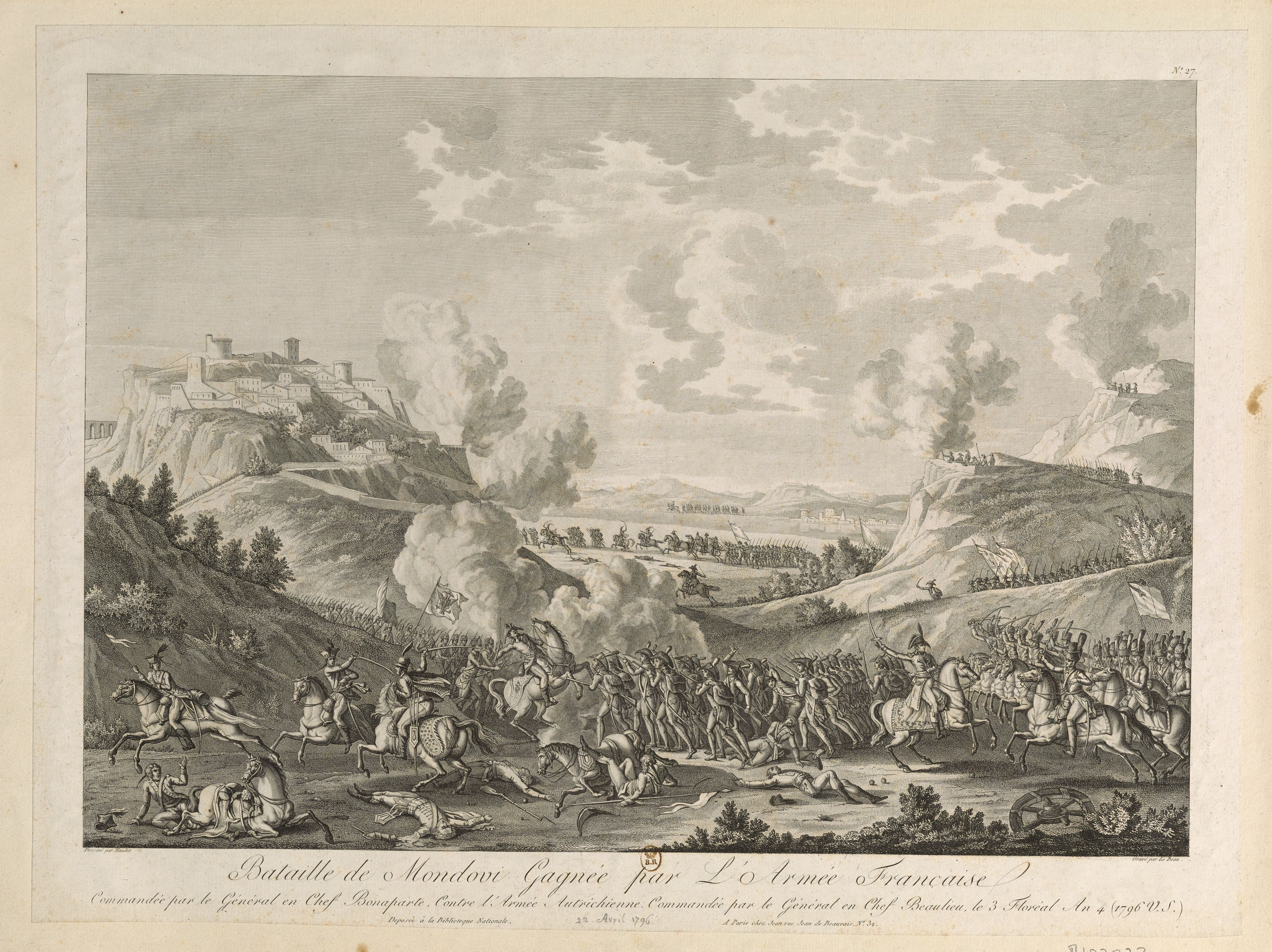 vue 1 - Bataille de Mondovi gagnée par l'armée française : commandée par le général en chef Bonaparte, contre l'armée autrichienne commandée par le général en chef Beaulieu, le 3 floréal an 4 (1796 v.s.) : [estampe] / dessiné par Naudet ; gravé par Le Beau.